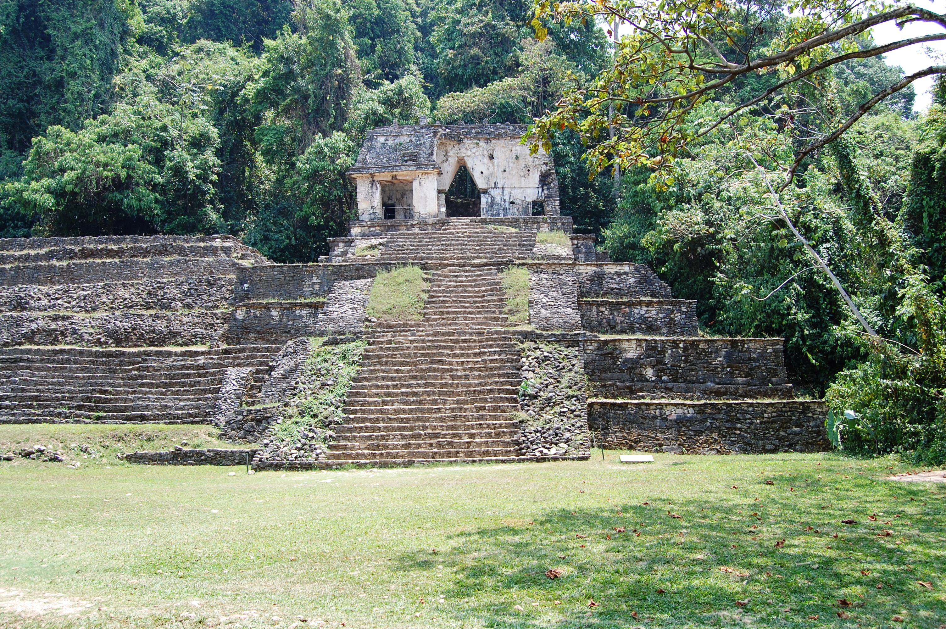 Palenque, Mexico Templo de la Calavera